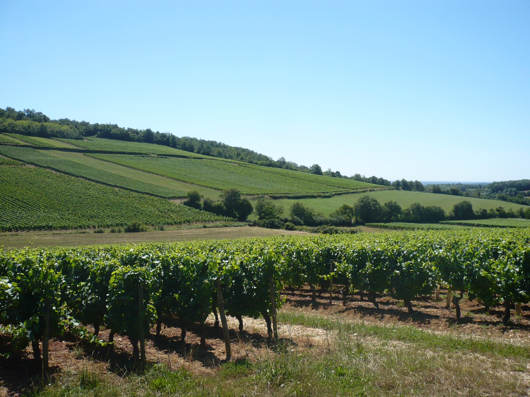 Chardonnay